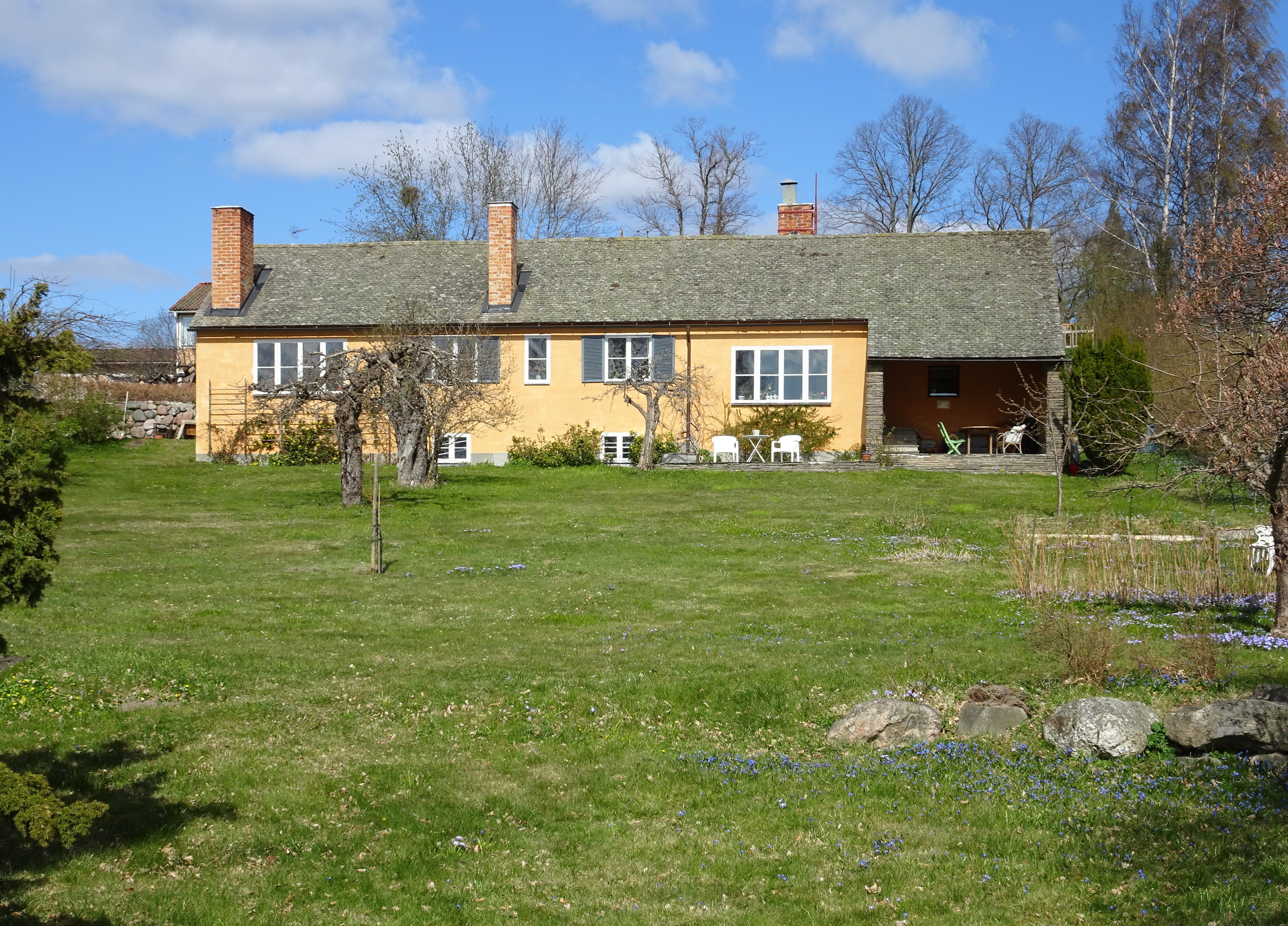 Sven Ivar Linds egen villa vid Kevinge strand 27 i , Danderyd, byggår 1945-1946.